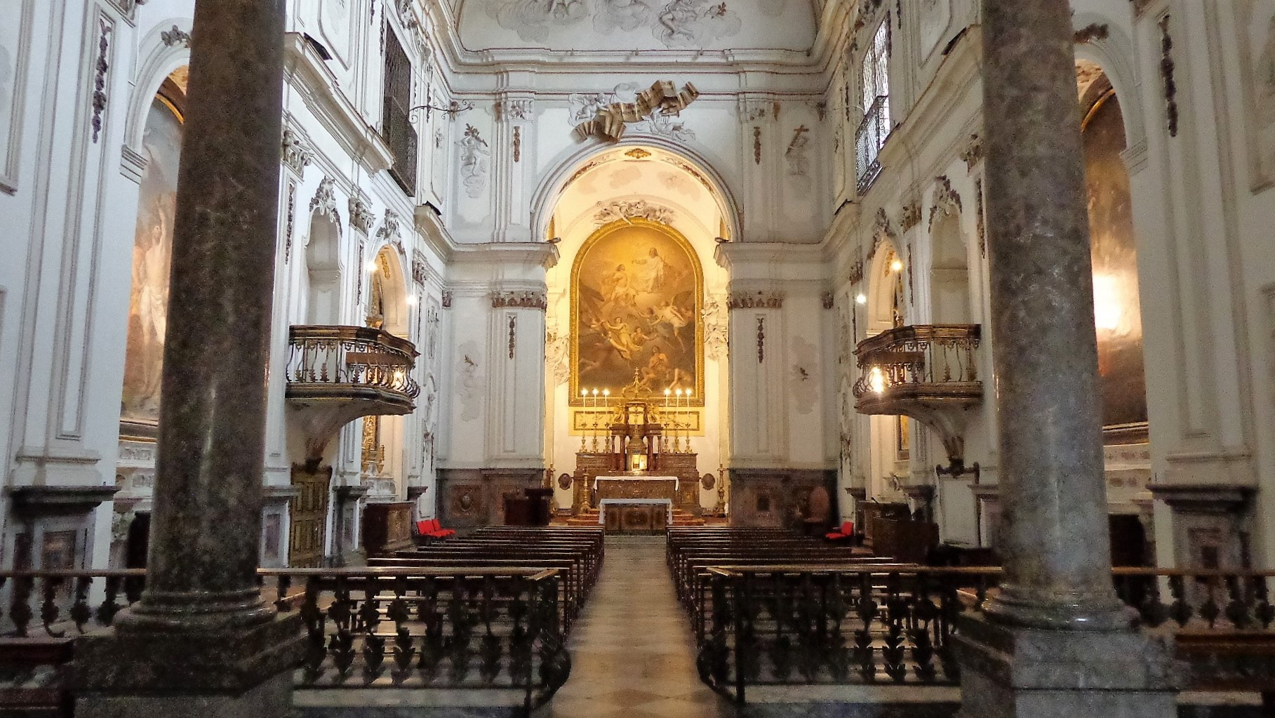 Navata.